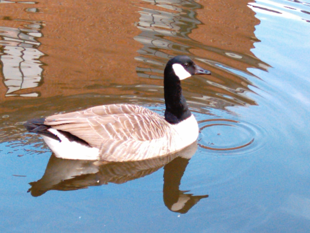 Mirrored Canada Goose